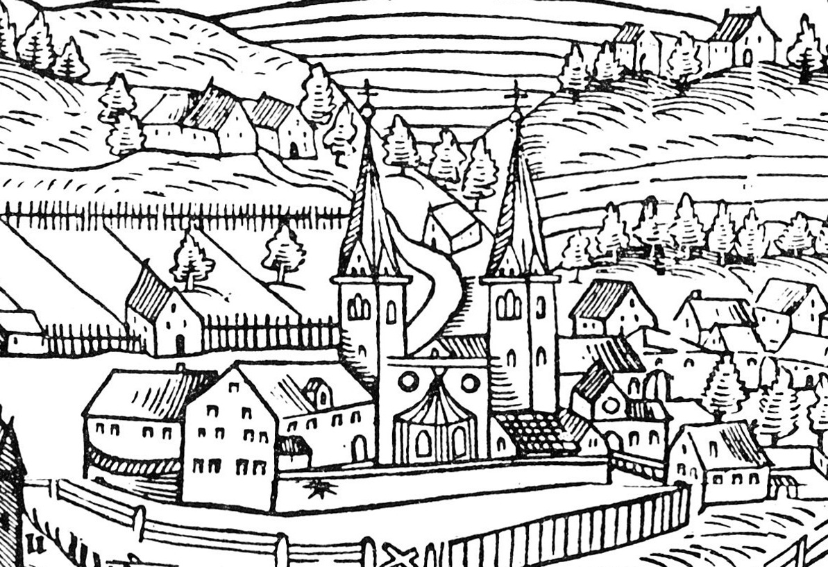 Ausschnitt aus einer alten Stadtansicht von Kempten: Marienmünster